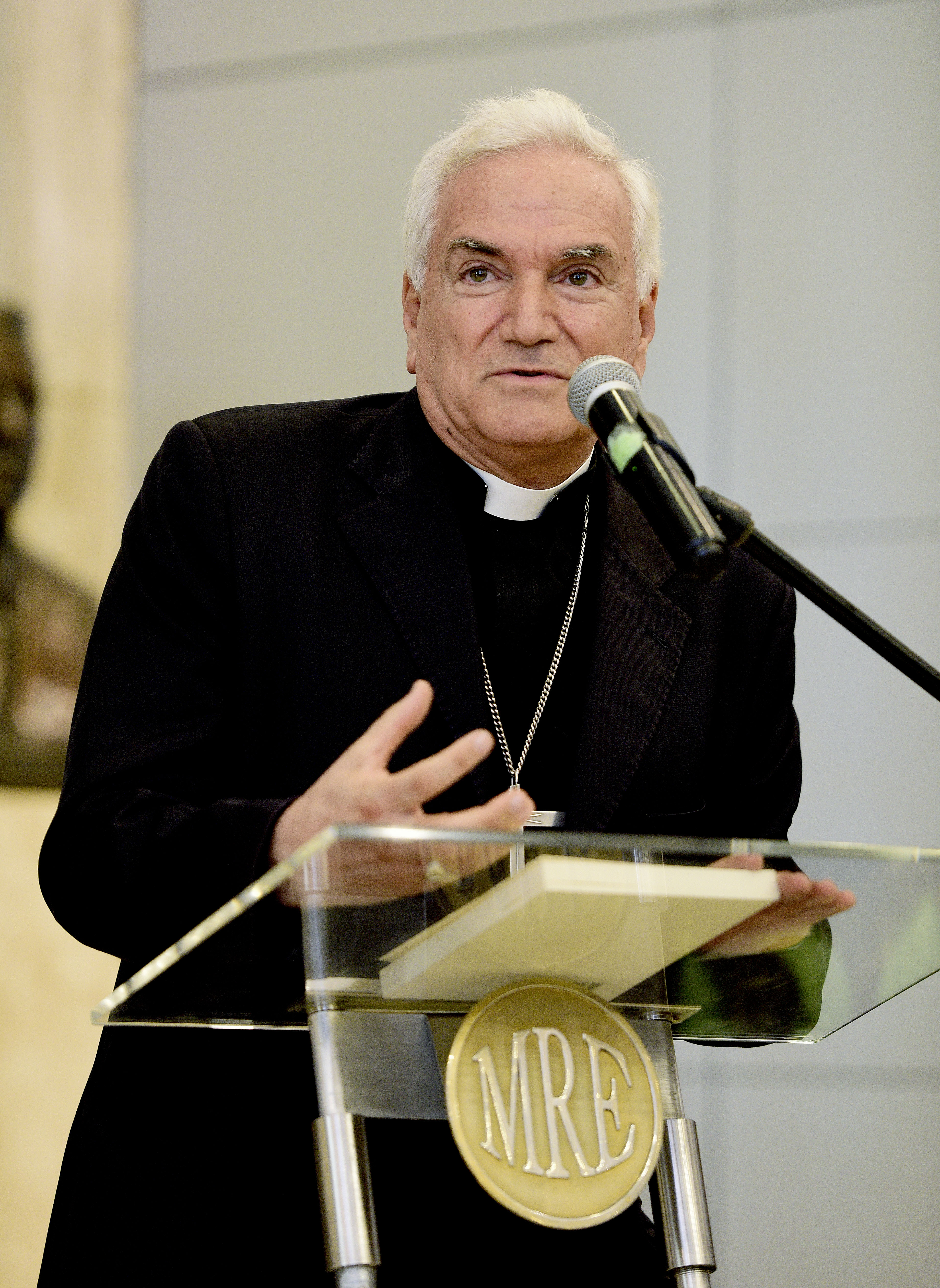 ​En la sede de la Cancillería, fue inaugurada la Muestra Documental “Las Relaciones entre el Perú y la Santa Sede”, efectuada como preludio a la próxima Visita Apostólica de Su Santidad el Papa Francisco al Perú, del 18 al 21 de enero de 2018. La ceremonia fue encabezada por el Secretario General del Ministerio de Relaciones Exteriores, Embajador Eric Anderson, y contó con la asistencia de Su Excelencia Reverendísima Monseñor Nicola Girasoli, Nuncio Apostólico de Su Santidad en el Perú, miembros del Cuerpo Diplomático y representantes del clero peruano.